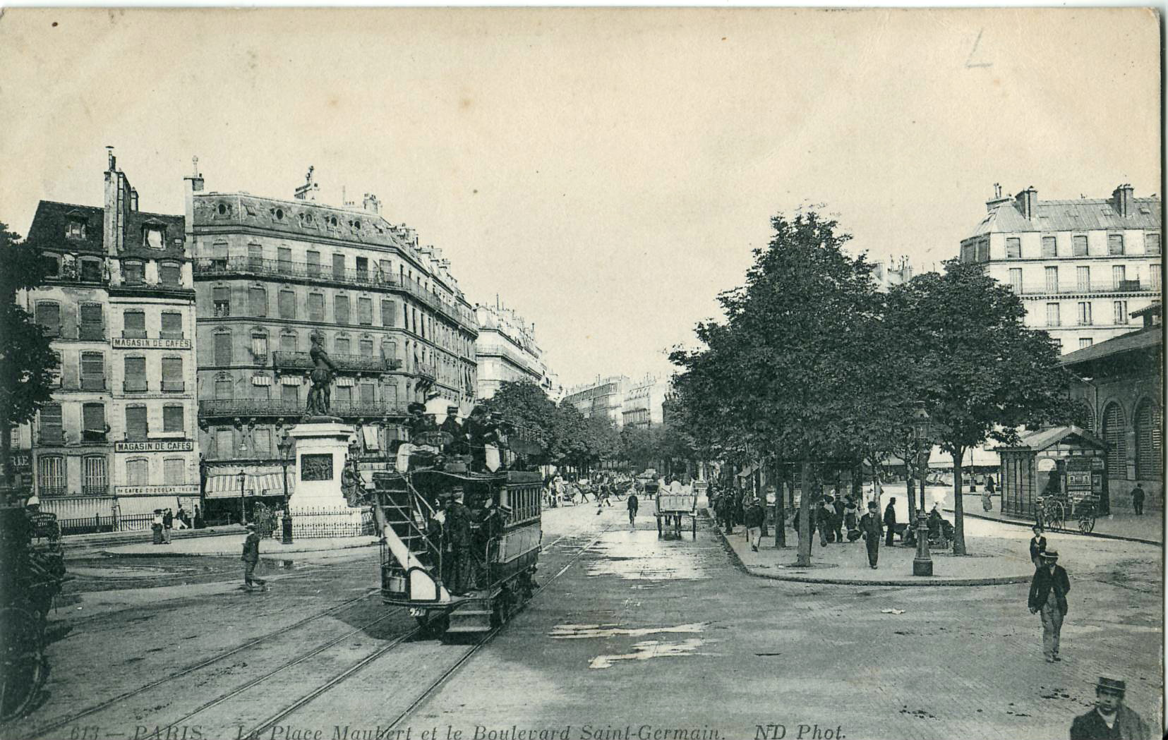 Carte postale ancienne éditée par ND, n°613 : PARIS - La Place Maubert et le Boulevard Saint-Germain